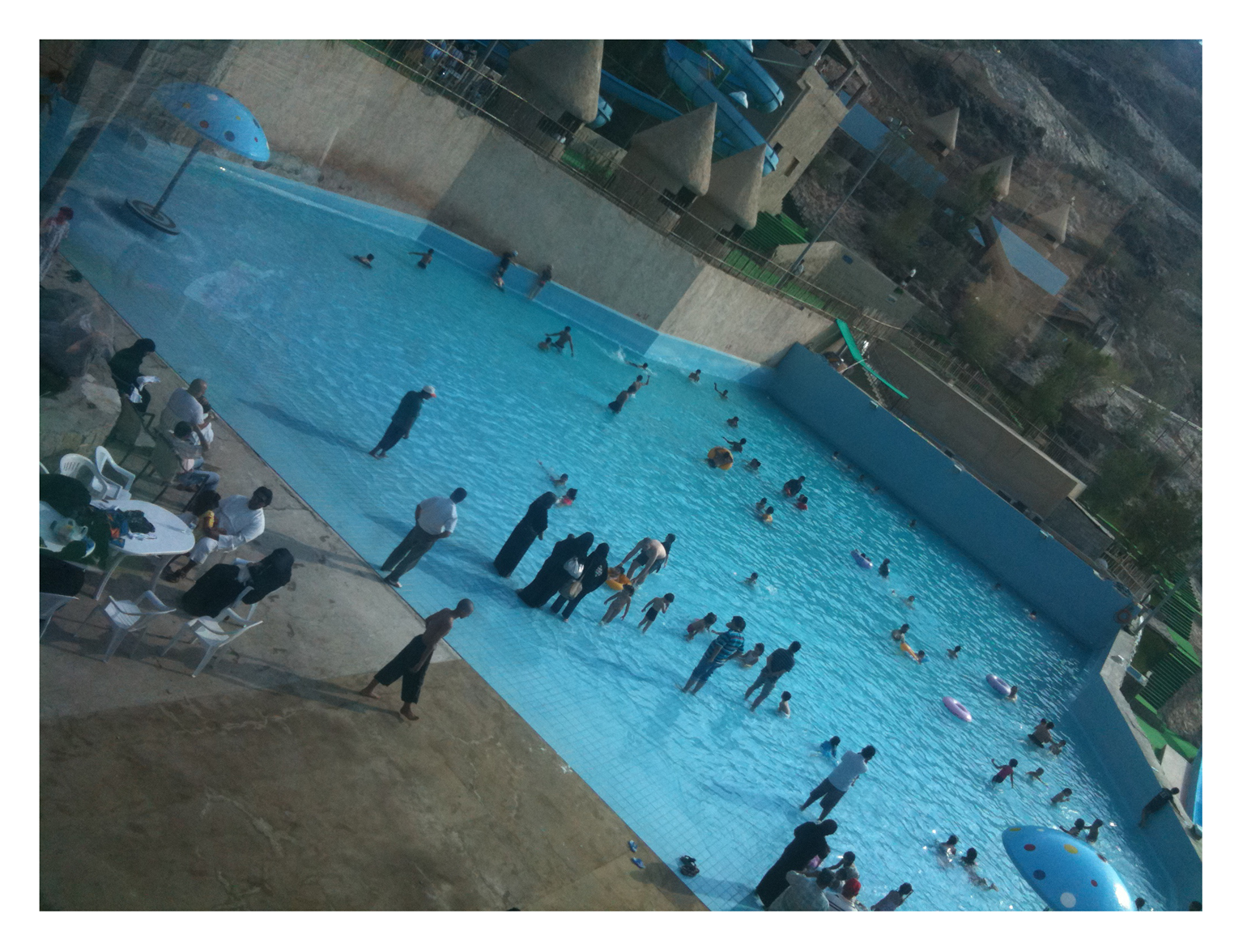 Ramada Al Hada Hotel Telefrique Station - Taif, Saudi Arabia